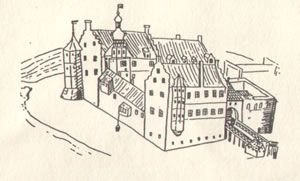 Die Oldersumer Burg um 1580 von Nordwesten (Staatsarchiv Aurich Rep. 244/B 2892)